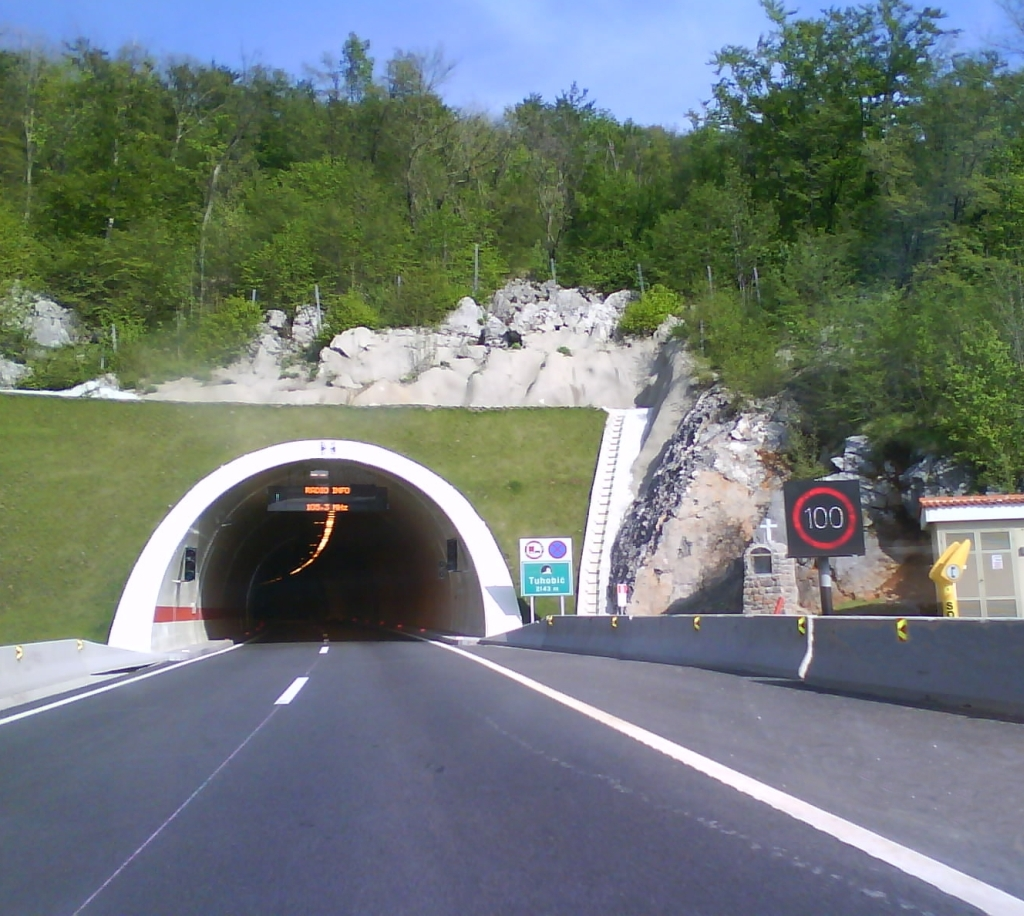 Tunel Tuhobić